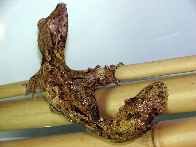 Uroplatus henkeli, a gecko